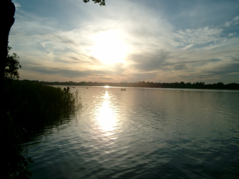 Zachód słońca nad Jeziorem Białym.